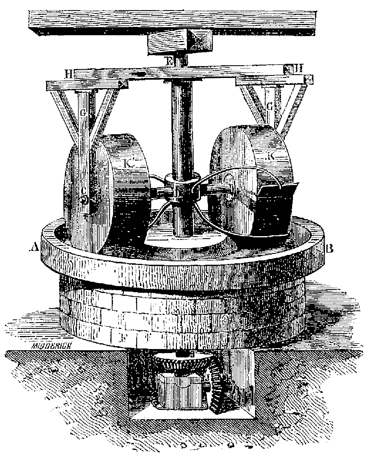 Moulin à meules pour la pulvérisation et le mélange des éléments de la poudre de chasse